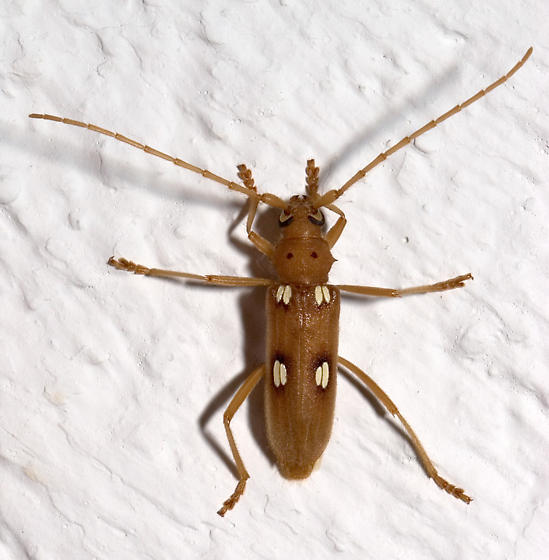 Eburia quadrigeminata